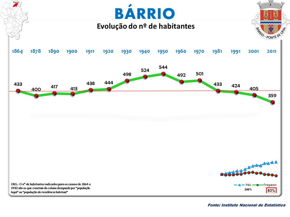 Censos 1864/2011